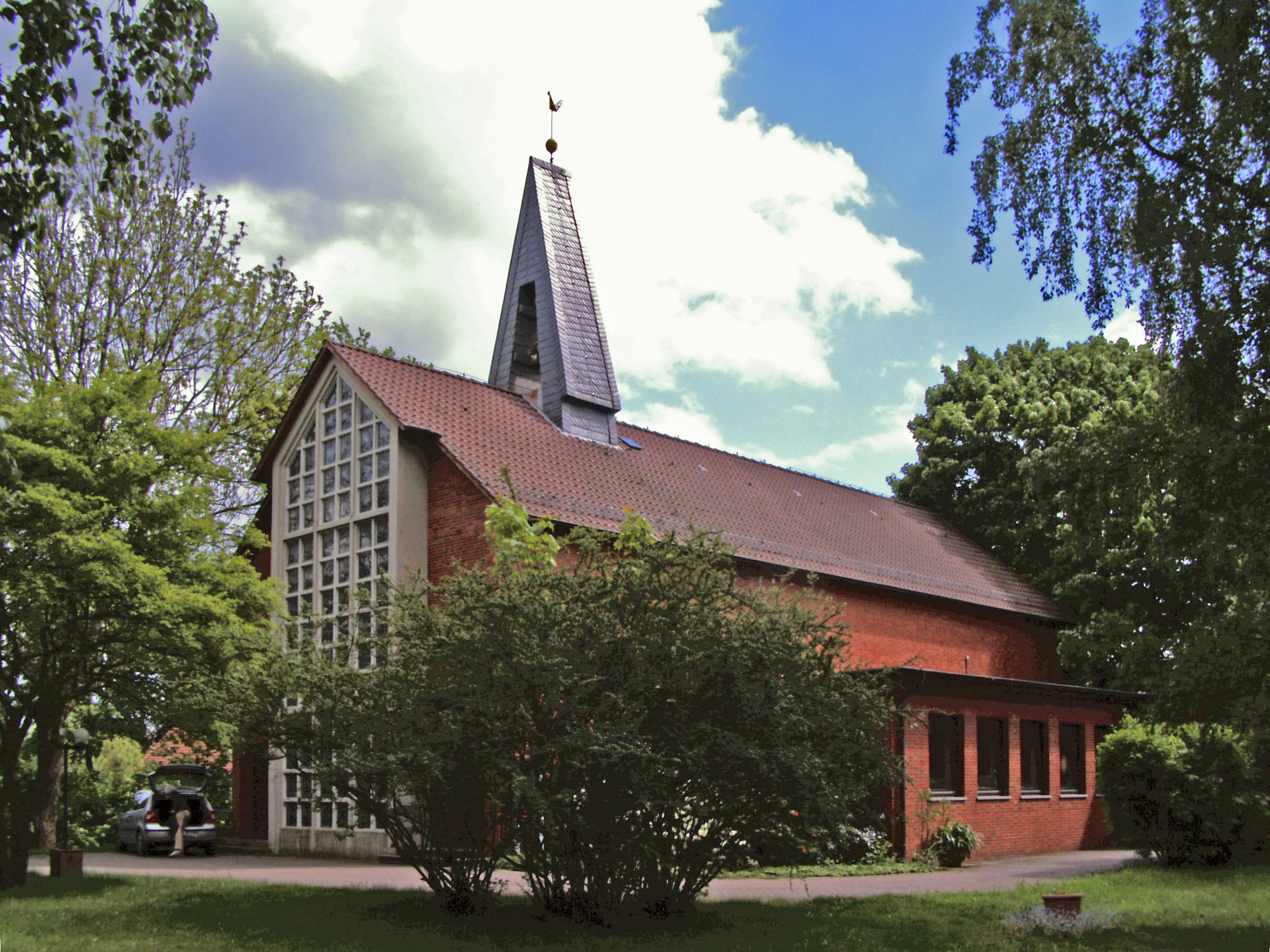 Ehemals katholische Kirche St. Barbara in Hänigsen, Ortsteil von Uetze